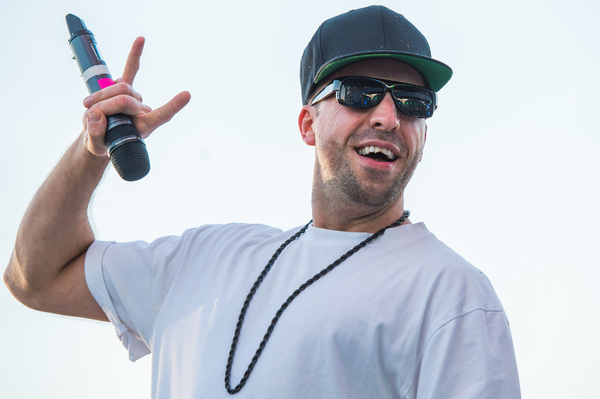 Die Atzen,Frauenarzt,Konzert,Livekonzert,Livemusik,Musik,Radio N1,Super Sommer Sause 2016,Vicente de Teba,Werk B Events